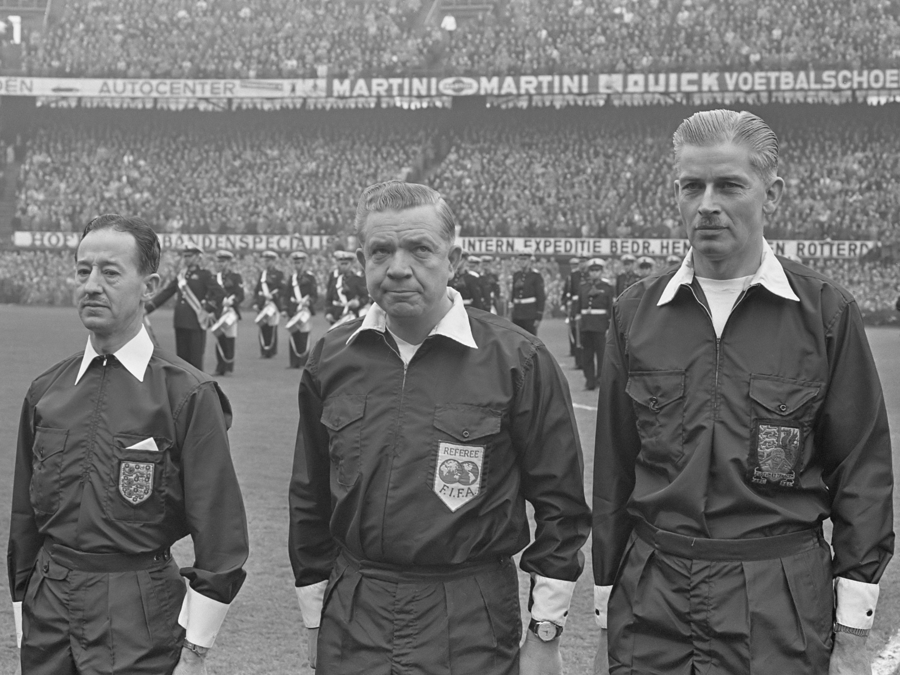 Nederland tegen Belgie 3-1, Arbritrale trio met in het midden scheidsrechter J. Finney (Eng) 17 april 1966